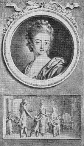 Originalzeichnung von Chodowiecki zu seinen Stichen für Christian Friedrich Himburgs (* 1733; † 1801) unrechtmässige Ausgabe von Goethes Schriften 1775.